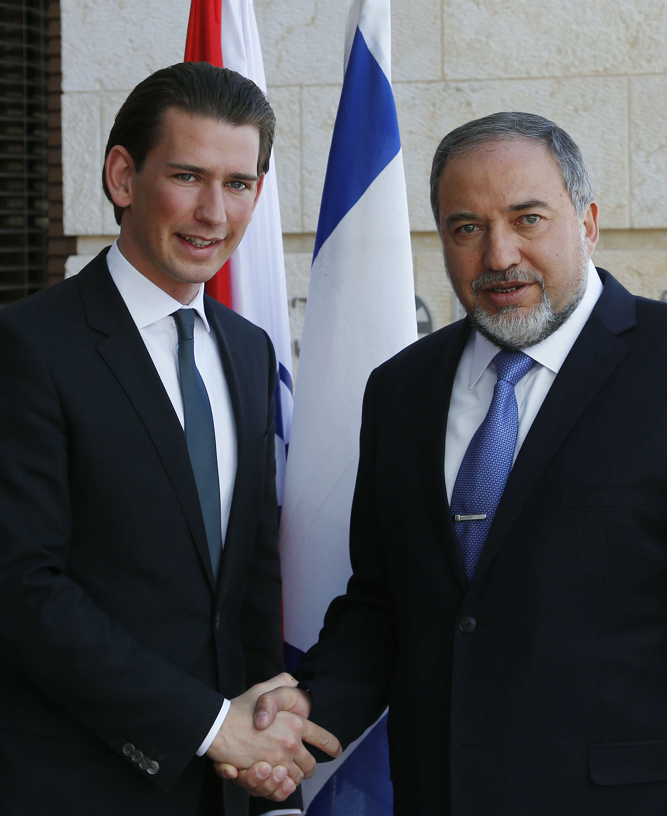 Arbeitsbesuch Israel. Außenminister Sebastian Kurz trifft den israelischen Außenminister Avigdor Liberman. Jerusalem. 22.04.2014, Foto: Dragan Tatic